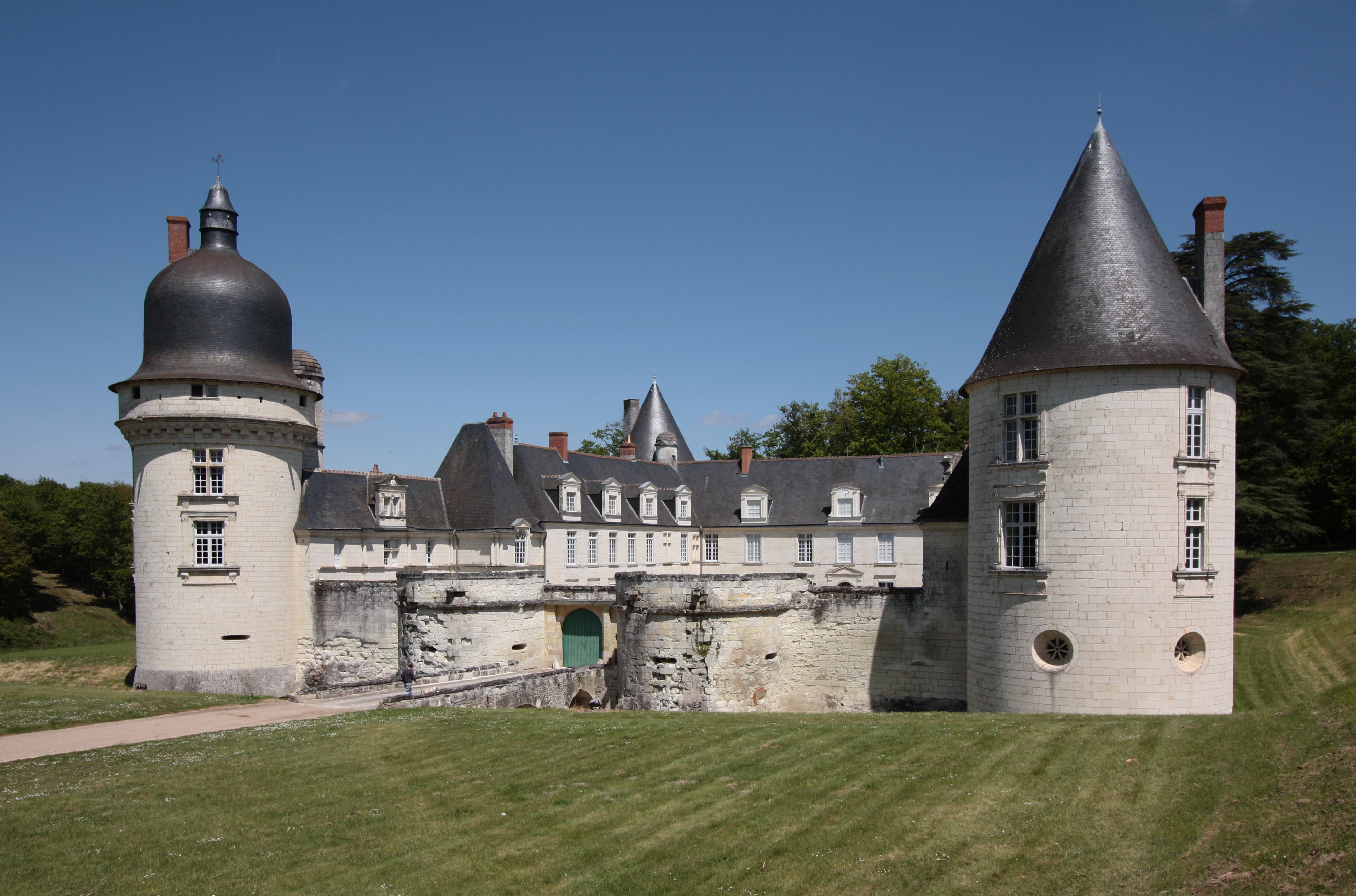 Schloss Le Gué-Péan im Département Loir-et-Cher/Frankreich.